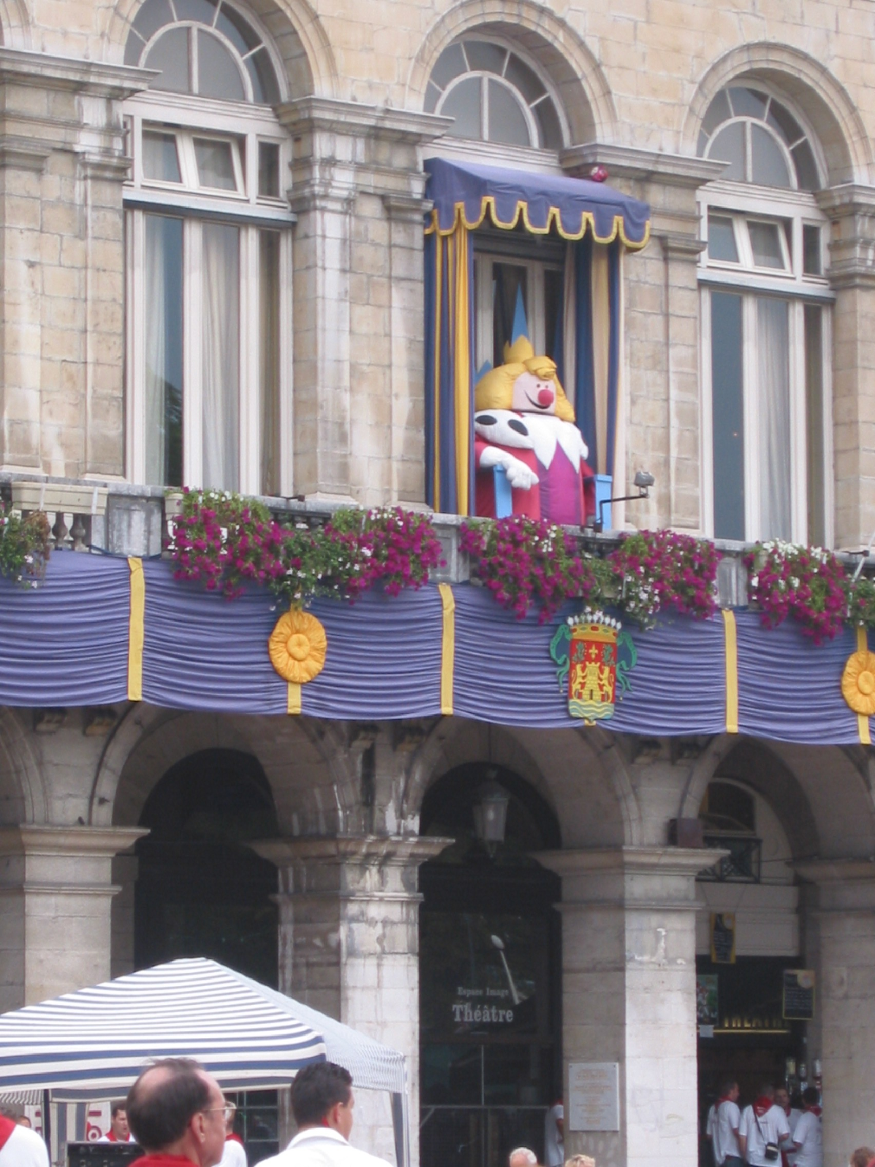 Fêtes de Bayonne, le roi Léon. Photo prise le 09/08/04 par Harrieta171